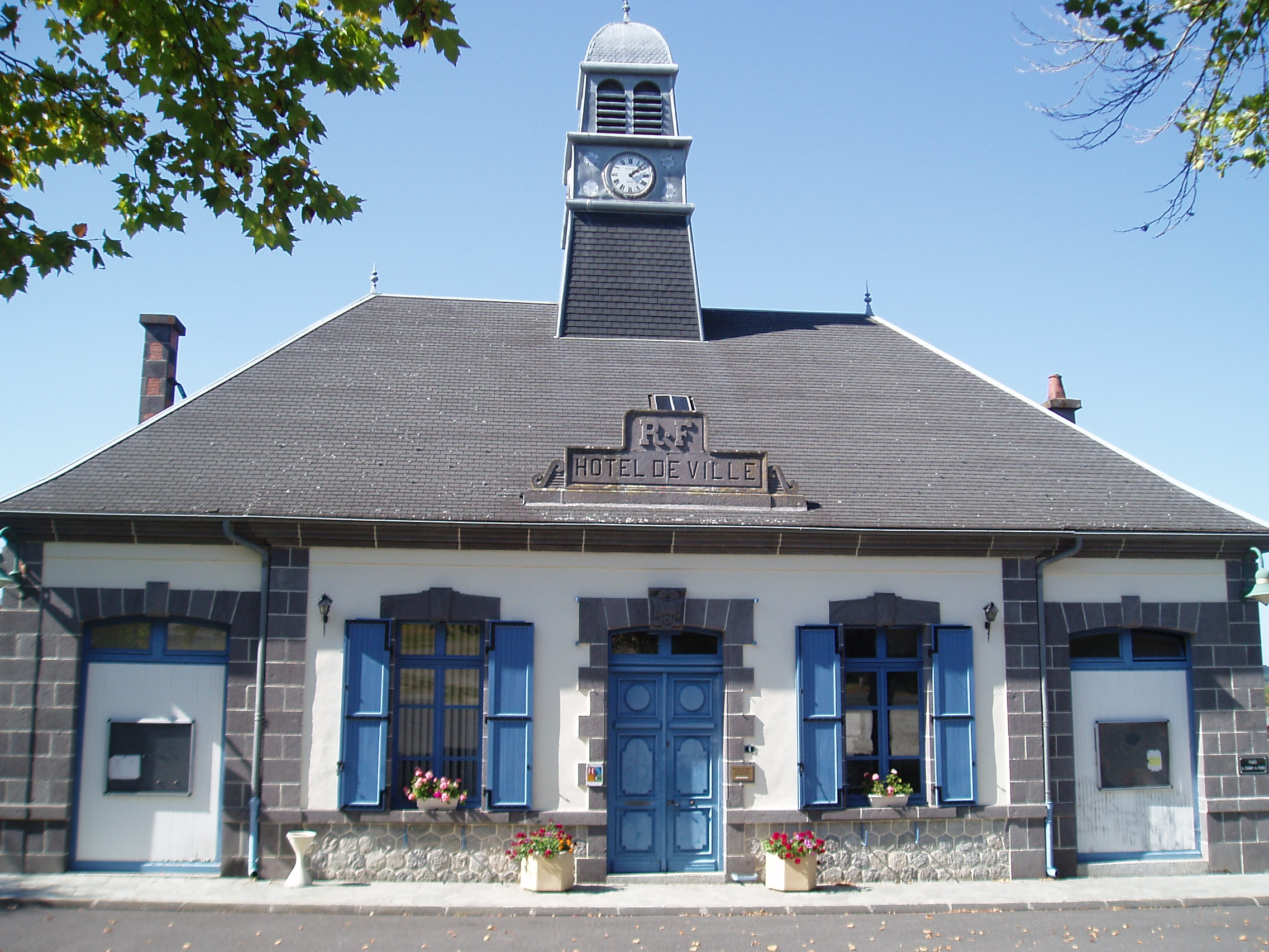 Mairie